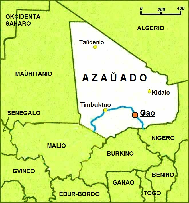 Azaŭado-mapo